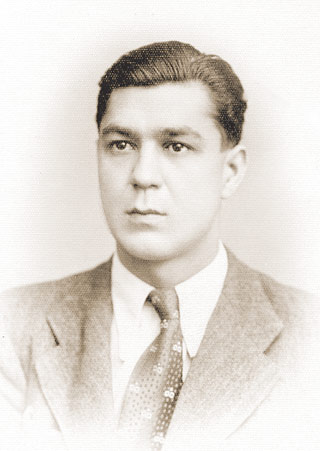 Dinu Adameșteanu in un ritratto giovanile, a Roma, nel 1940 Licensing Categoria:Immagini di Dinu Adameşteanu